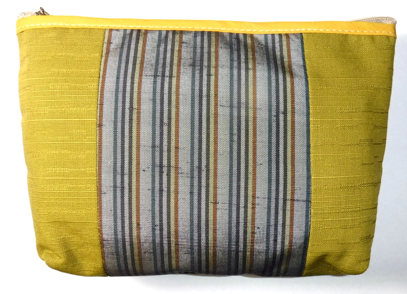 牛首紬は、主に石川県白山市白峰地区において生産される紬織物。その絹織物から作られたポーチ